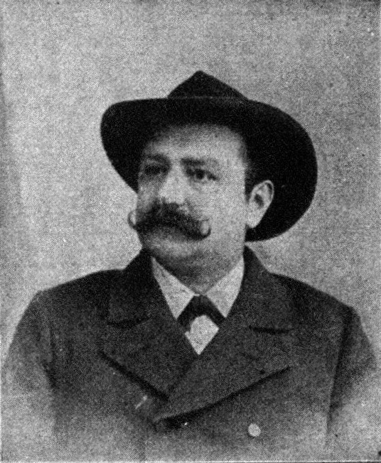 Österreichischer Politiker, Reichsratswahl 1907, Name siehe Dateiname